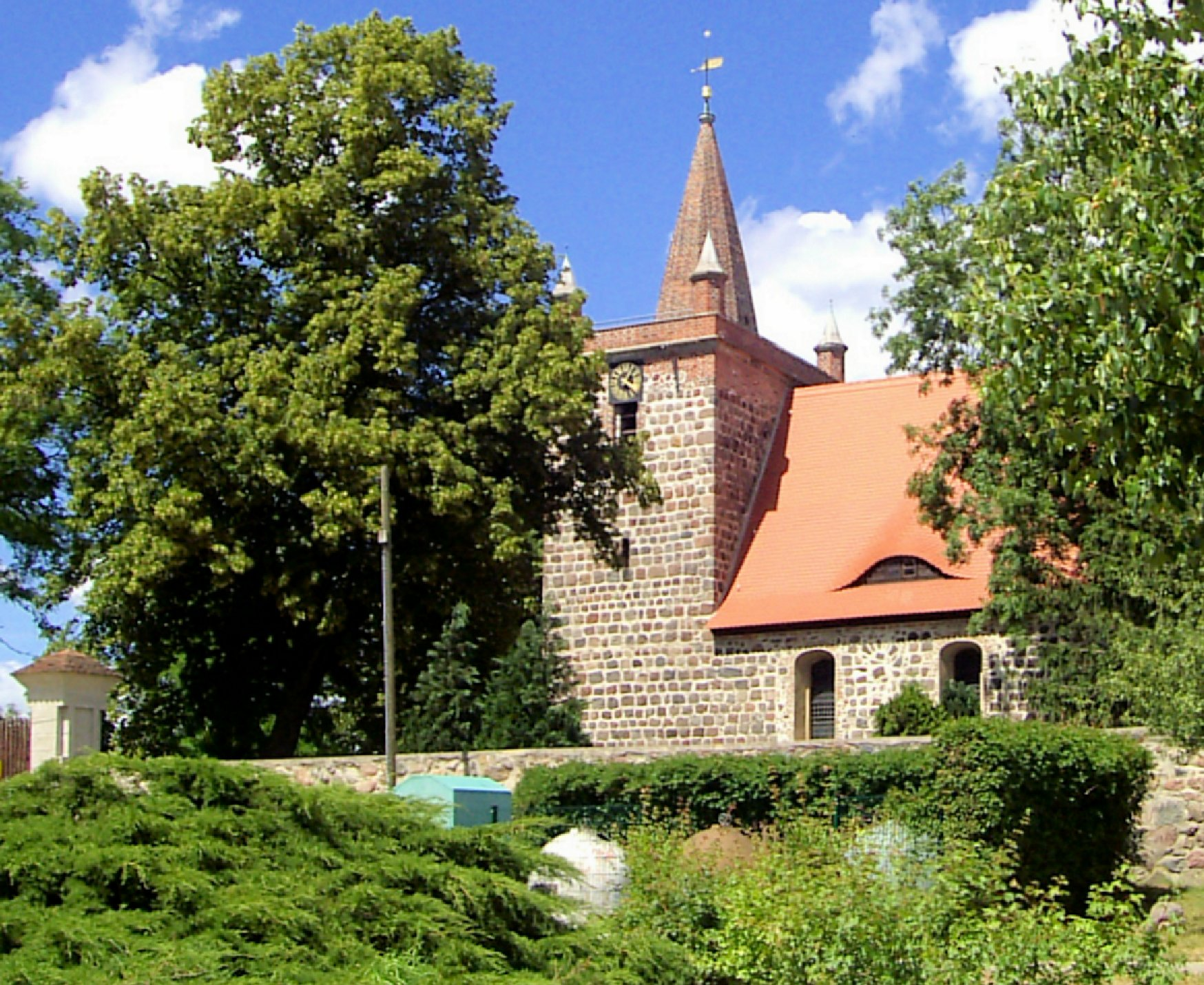 evangelische Kirche in Heinersdorf